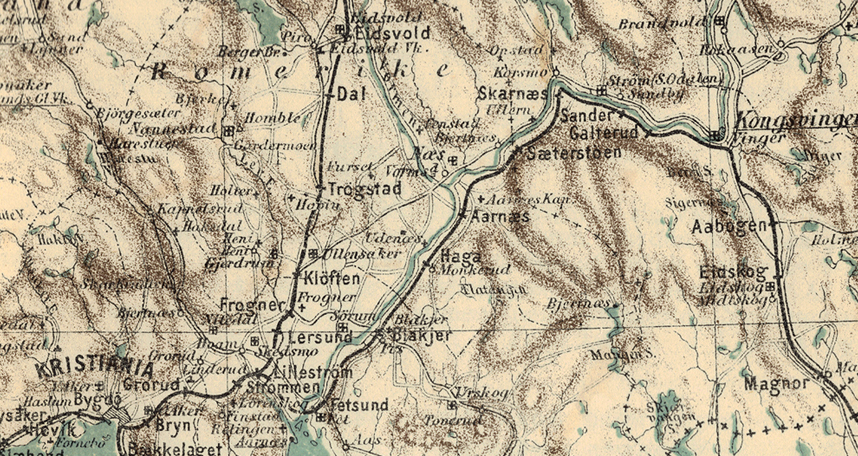 Kart over Kongsvingerbanen